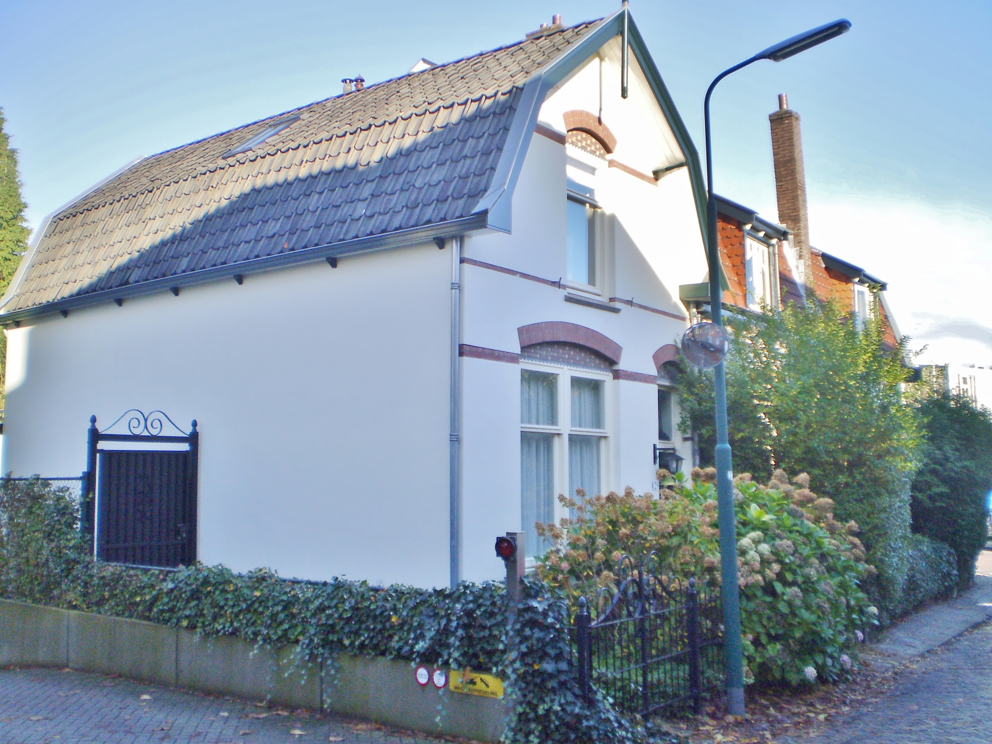 Turfstraat 2